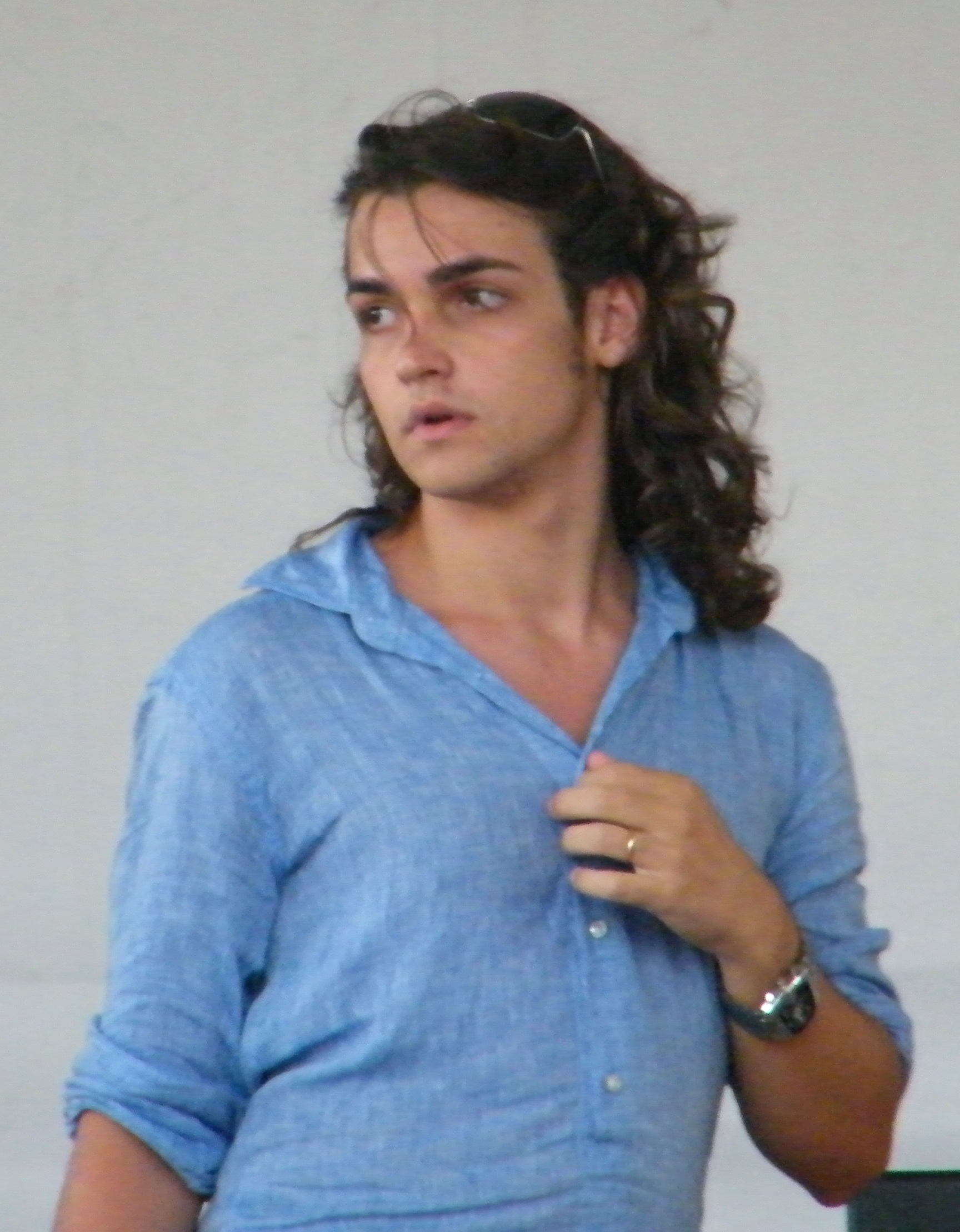 Valerio Scanu a La Maddalena (Italia) prova per il concerto